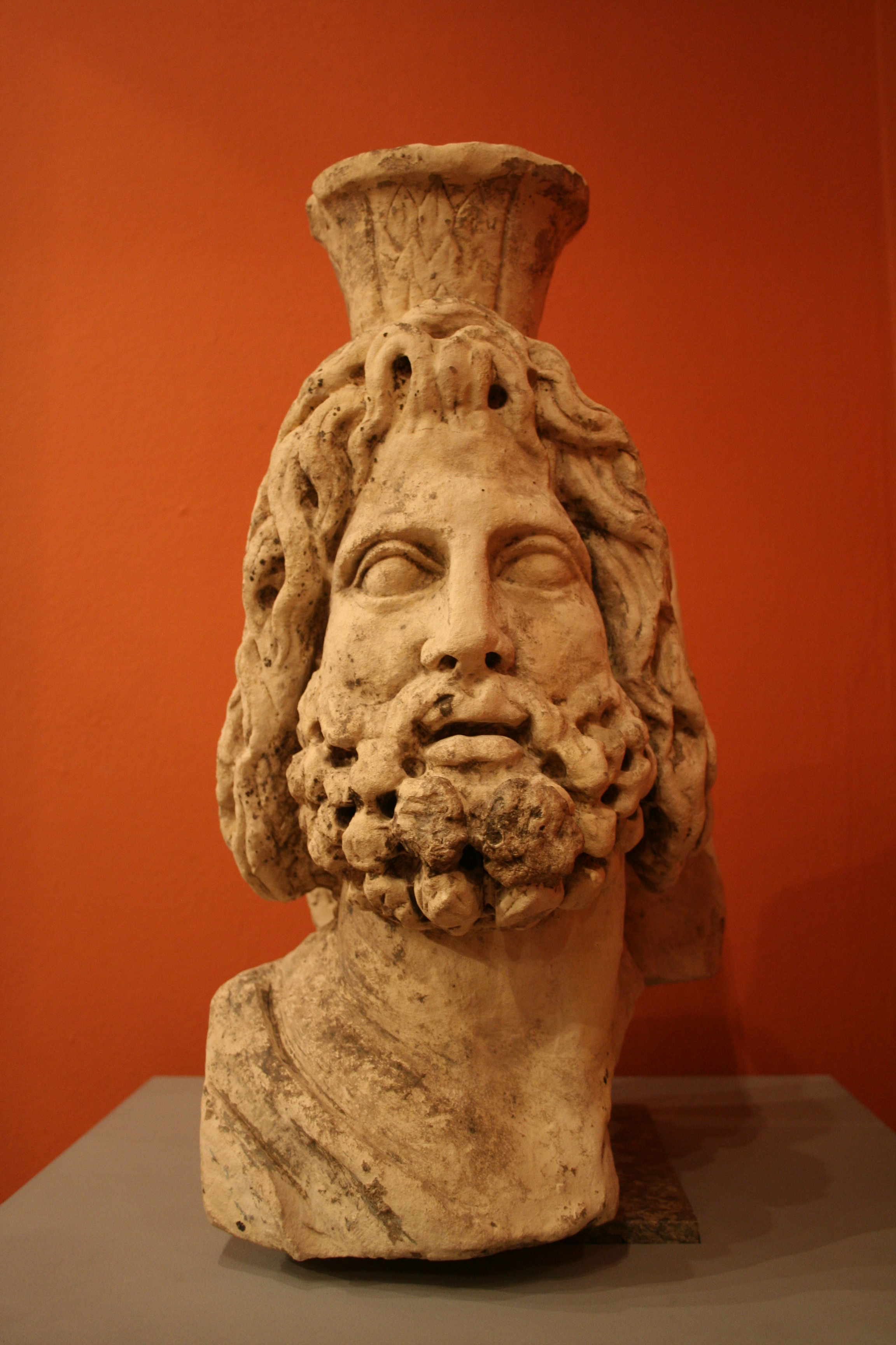 Kopf des Serapis, Spätzeit bis Römerzeit